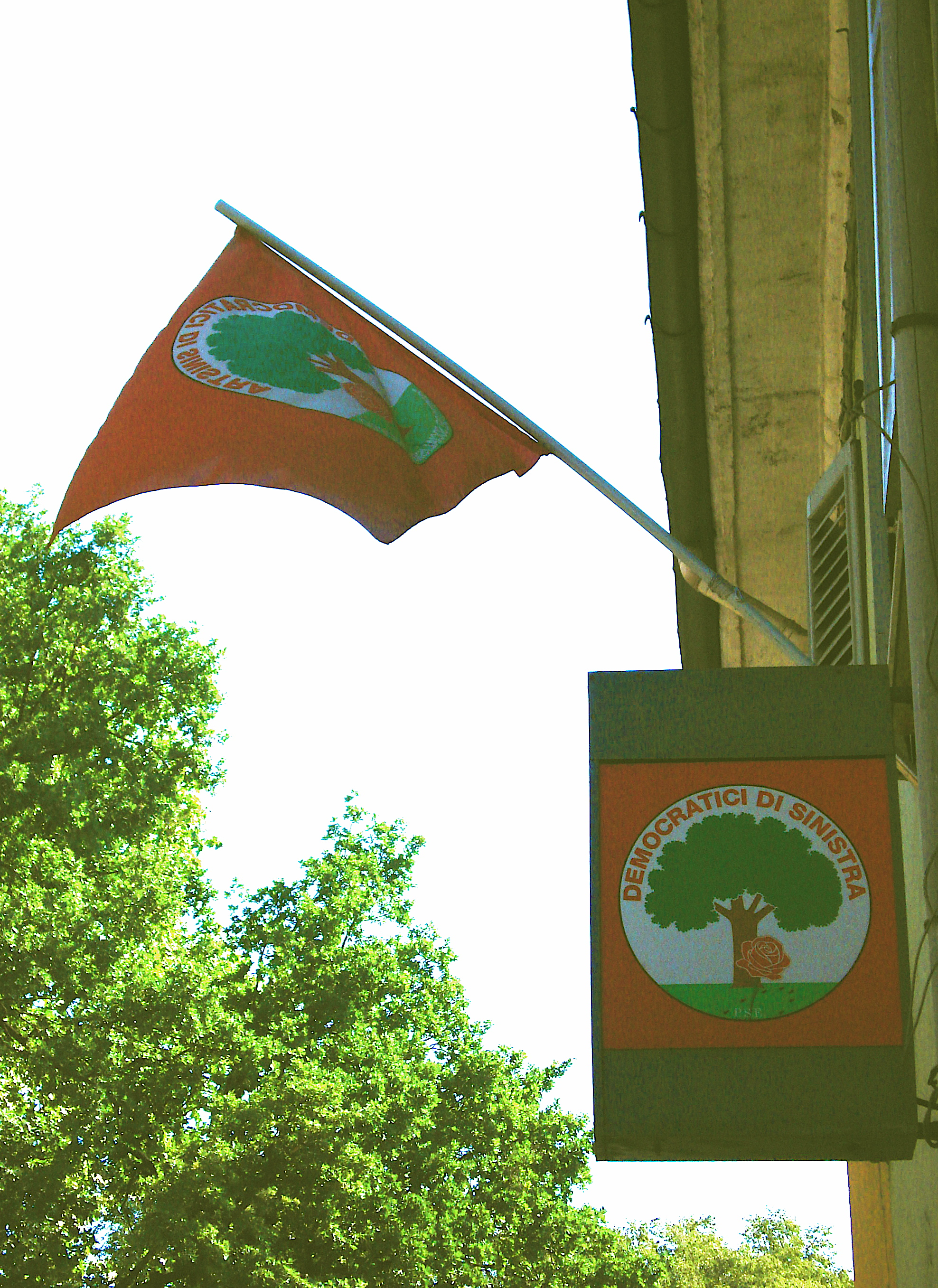 Pogliano Milanese, Italy